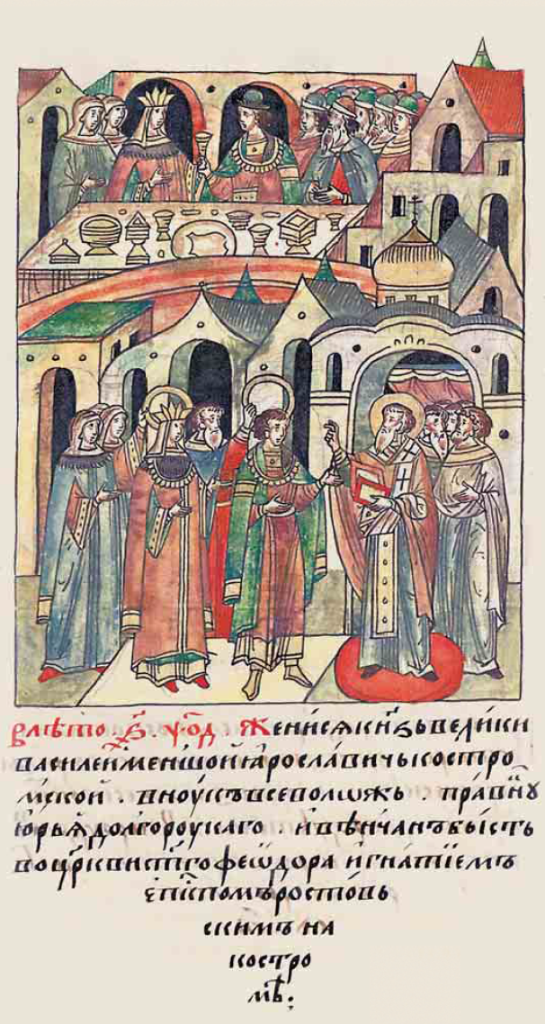 Лицевой летописный свод (том 6 стр. 302): В лето 6774 Женися князь велики Василей Меньшой Ярославичь Костромской, внукъ Всеволожь, правнукъ Юрья Долгорукаго, и венчанъ бысть во церкви святаго Феодора Игнатиемъ епископомъ Ростовским на Костроме